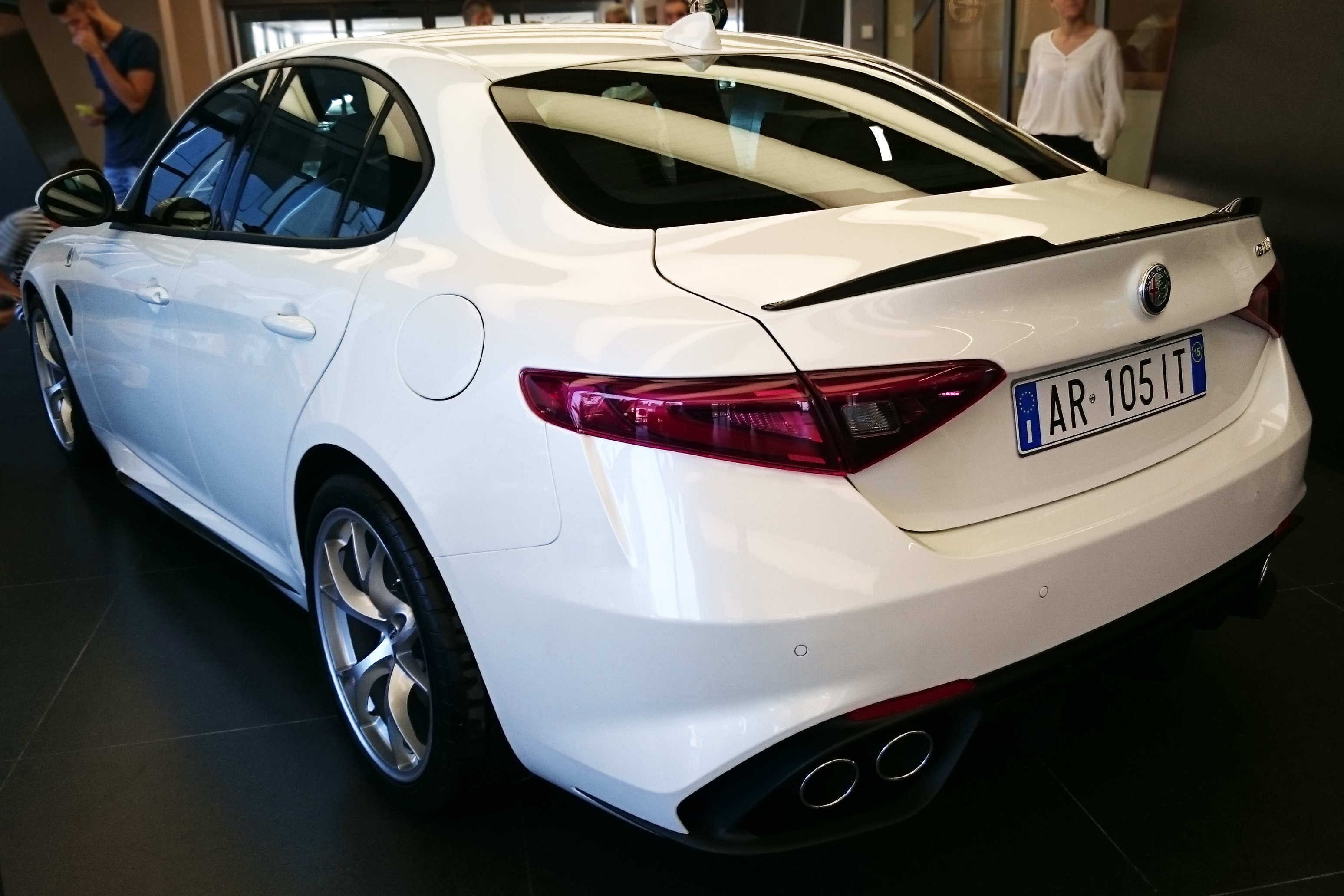 Un modello pre-serie (fatto a mano) della Alfa Romeo Giulia 2015 esposto in anteprima mondiale al rinnovato Museo Alfa Romeo di Arese in occasione dei 105 anni del marchio